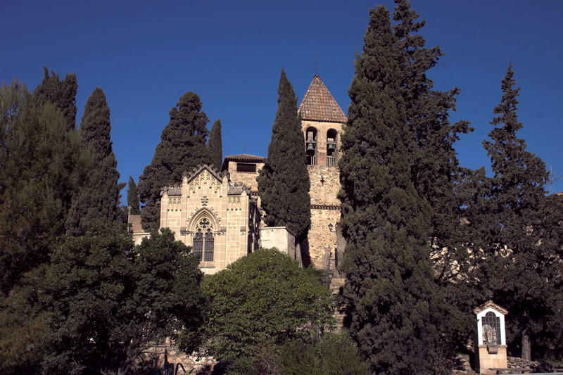 Església de la Doma (la Garriga, Valles Oriental, Catalonia, Spain) Romànic / Románico / Romanesque s. X + gothic s. XV